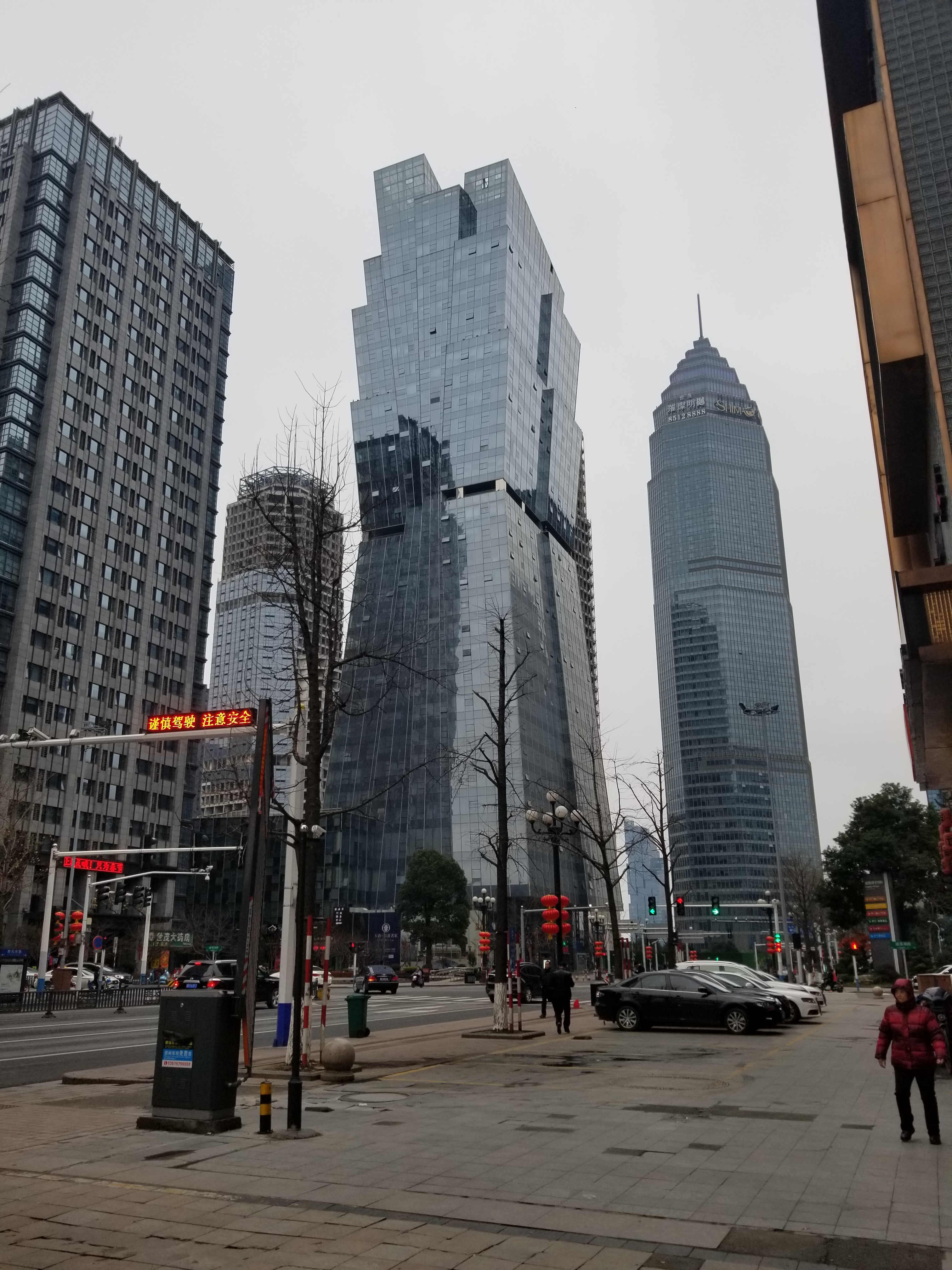 紹興新城區 世貿廣場附近